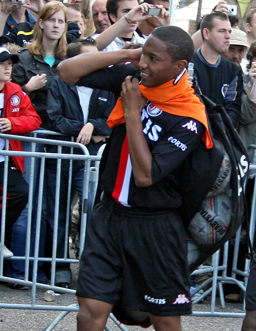 Jonathan de Guzman (Feyenoord)